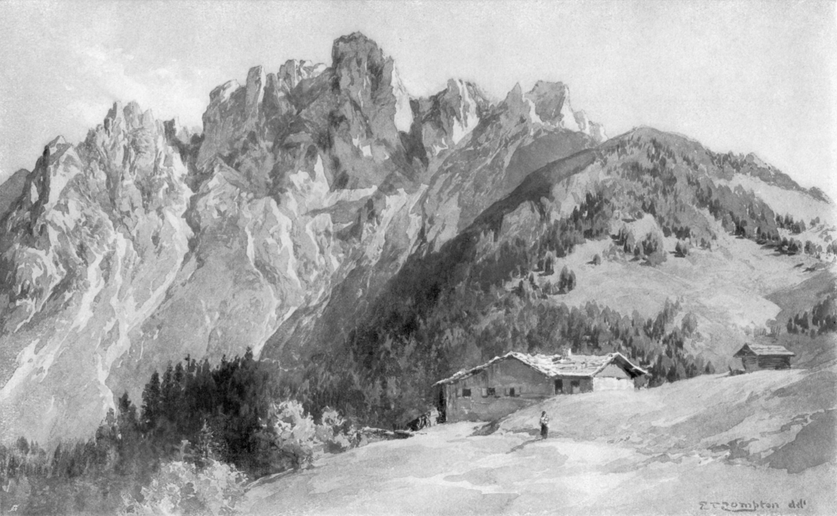 Elsspitze und Katzenköpfe von der Furkaalpe